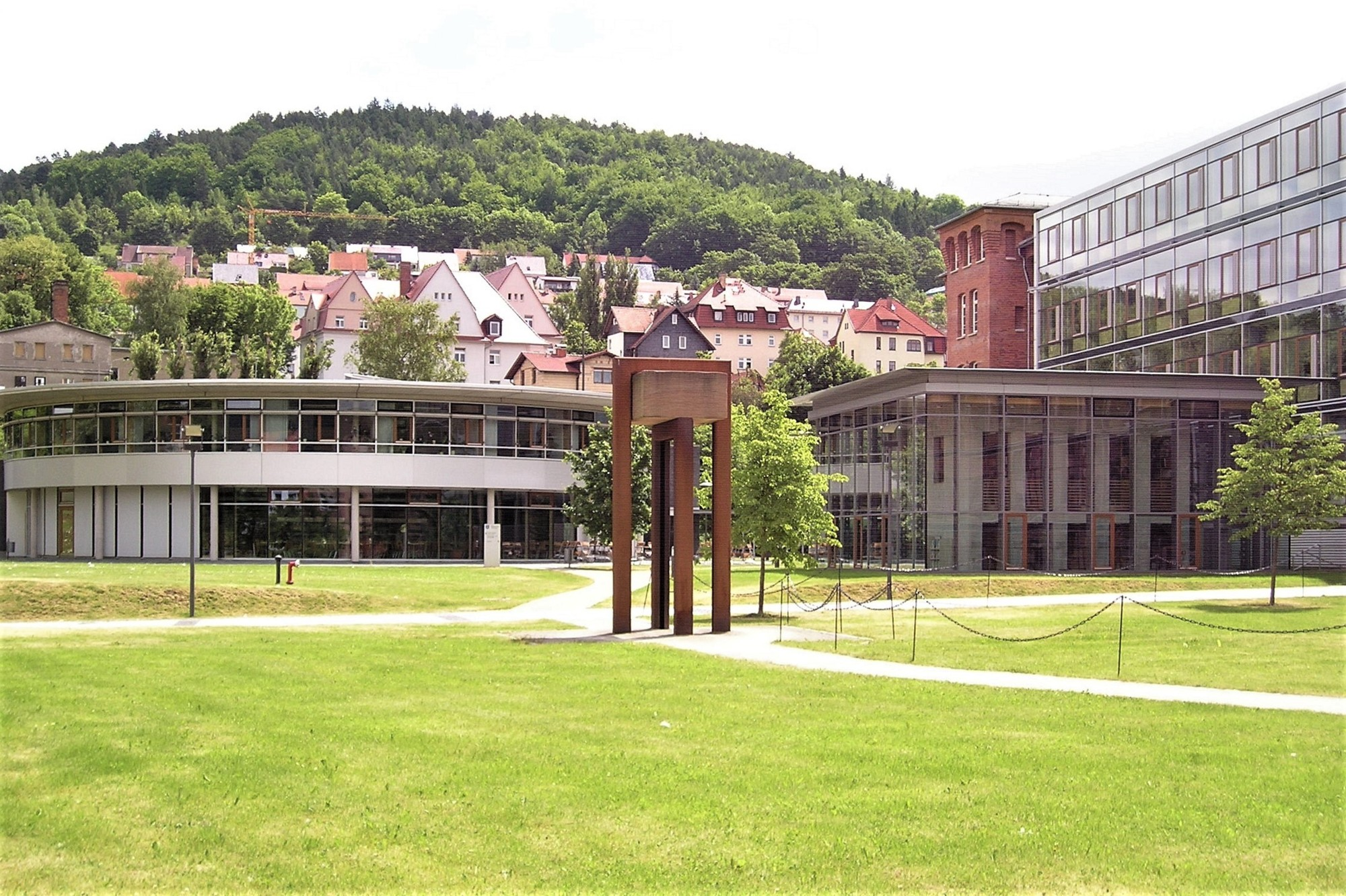 Justizzentrum Meiningen: Bibliothek und Kantinengebäude/Bewährungshilfe, im Vordergrund: Skulptur von Christoph Mancke